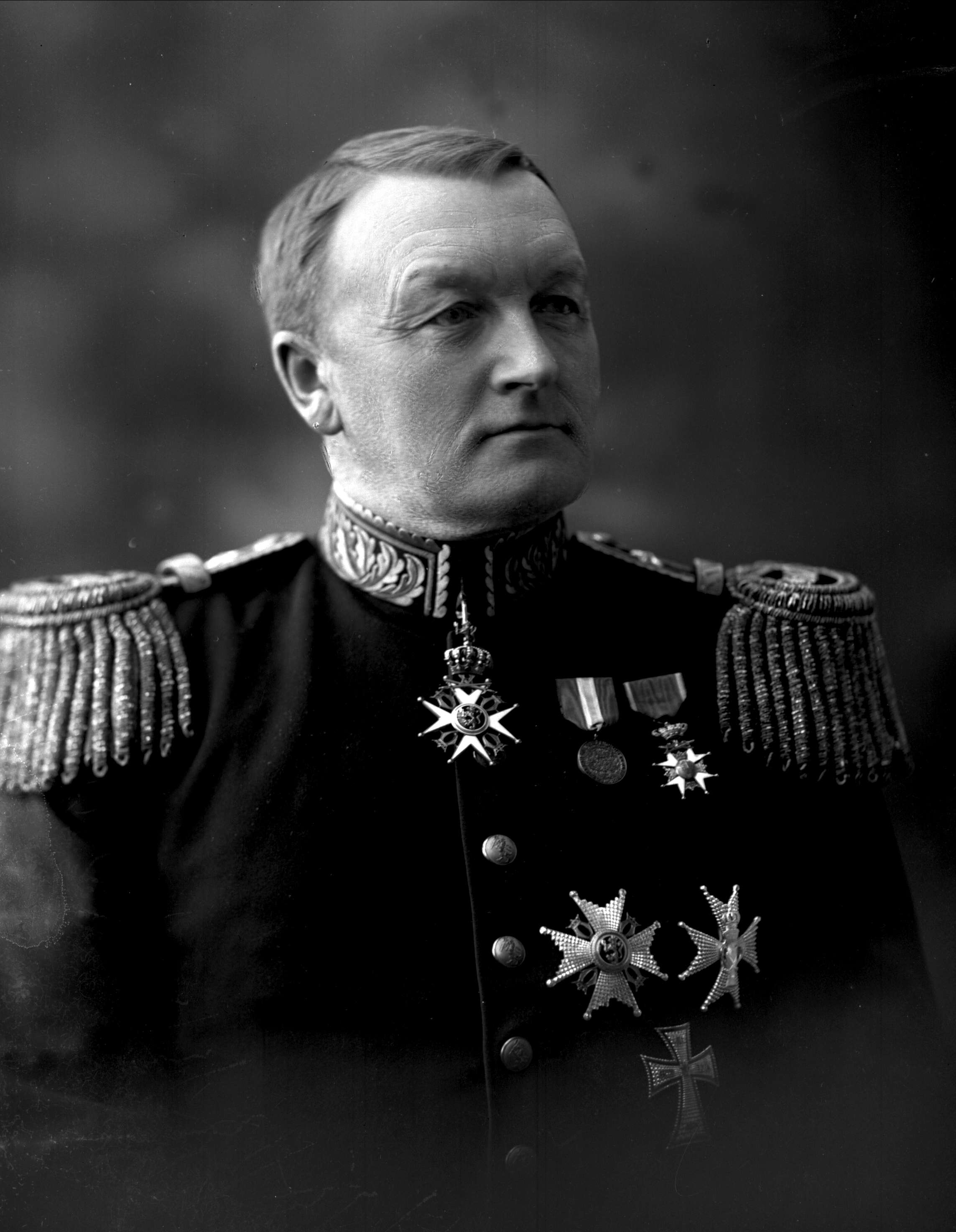 Jens Kristian Meinich Bratlie som generalkrigskommissær.